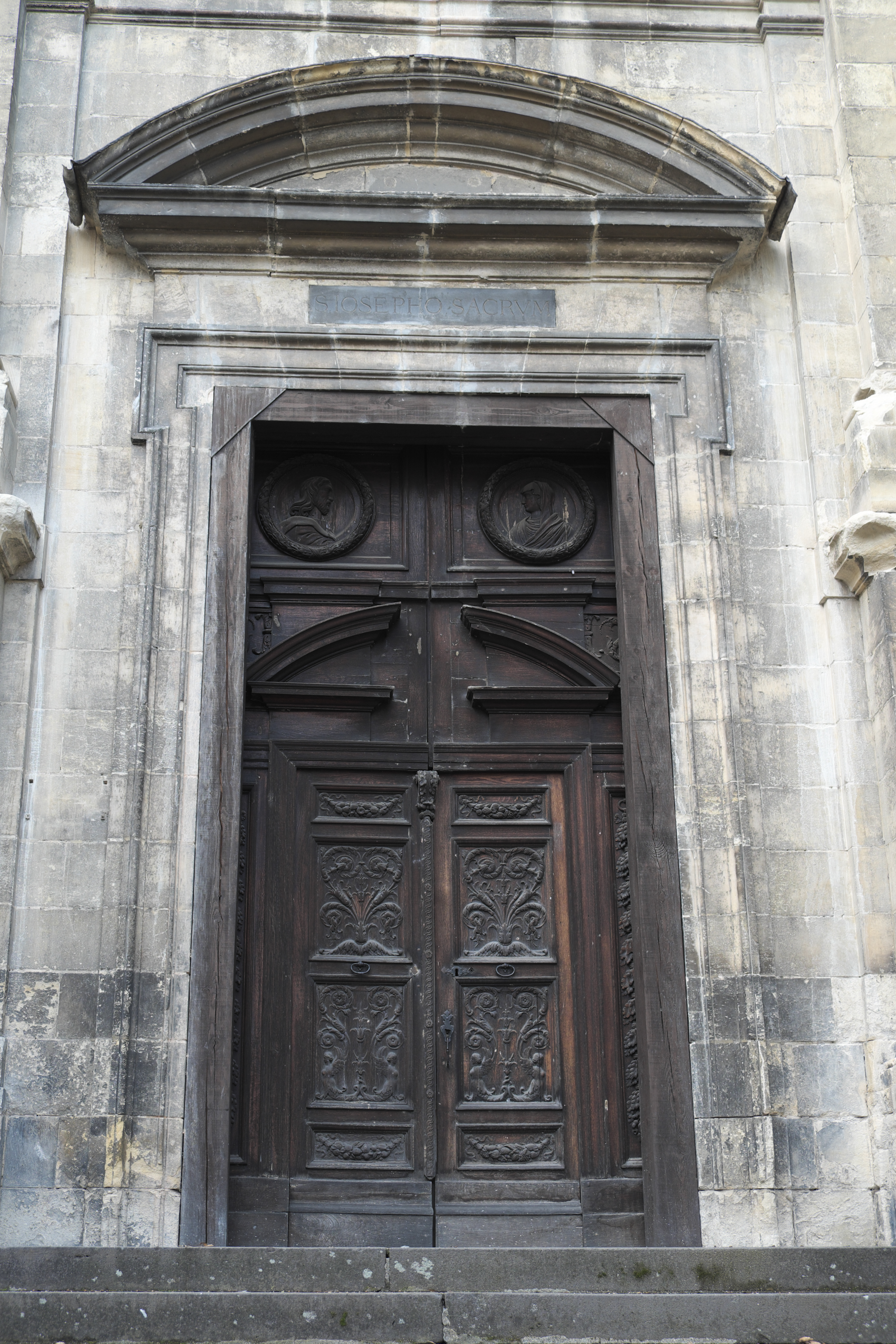 Kapelle Saint-Joseph, ehemalige Kapelle des Ordens von der Heimsuchung Mariens (Chapelle de la Visitation) in Moulins im Département Allier (Auvergne-Rhône-Alpes/Frankreich), Portal